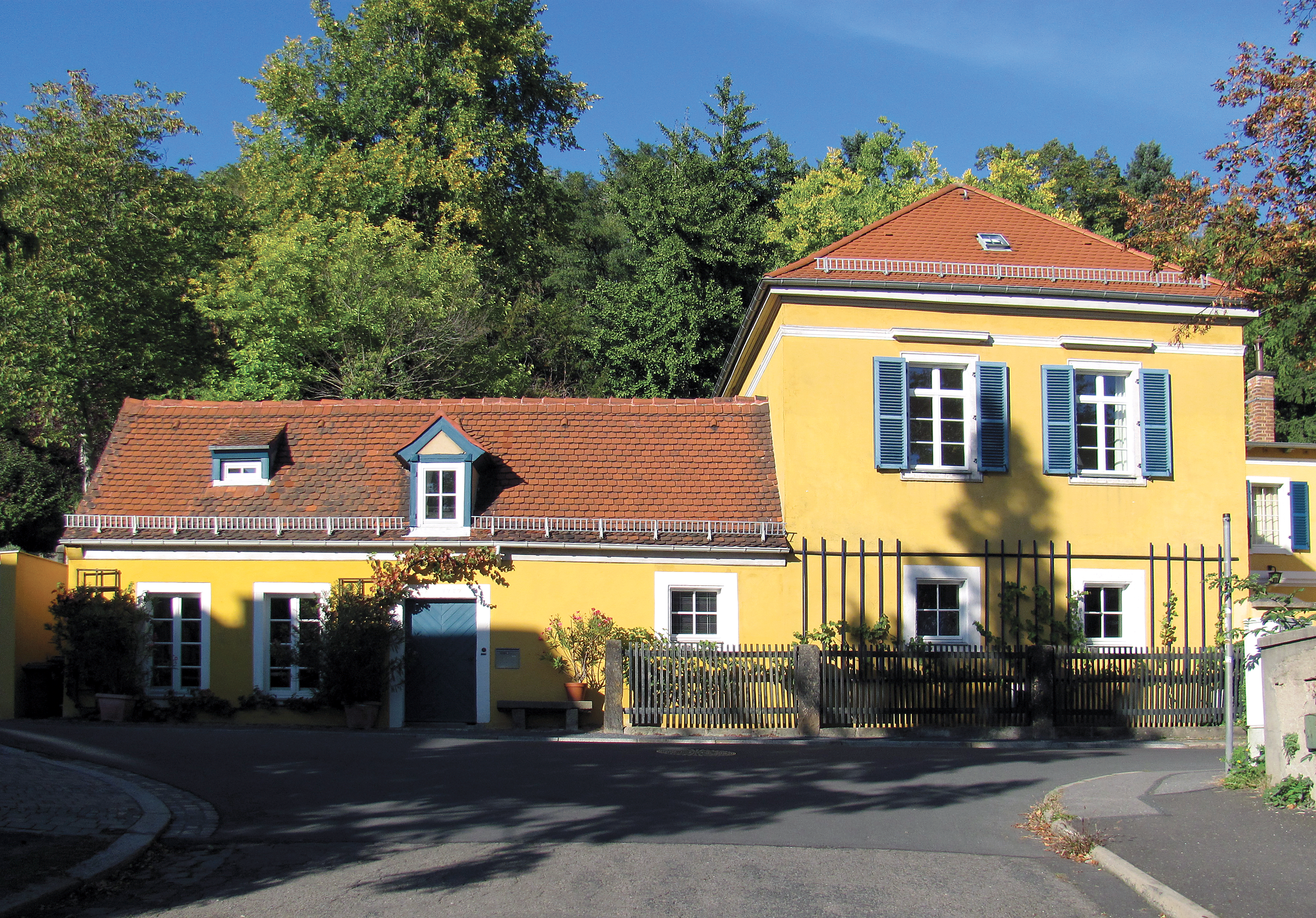 Radebeul, Minckwitzscher Weinberg, Obere Bergstraße 30b